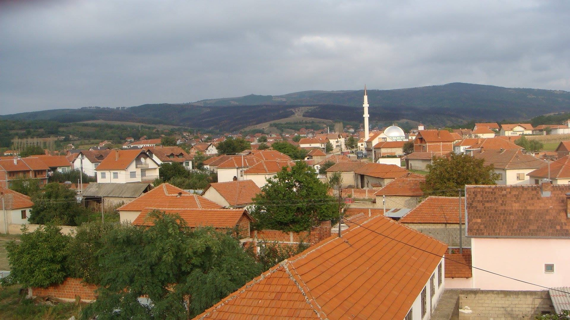 fshati